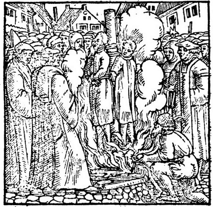 Abbildung des Martyriums der Augustinermönche Johann Esch und Heinrich Voss, die 1523 in Brüssel wegen ihres Bekenntnisses zur Lehre Martin Luthers verbrannt wurden